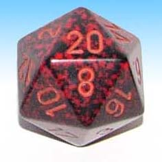 Dado a venti facce